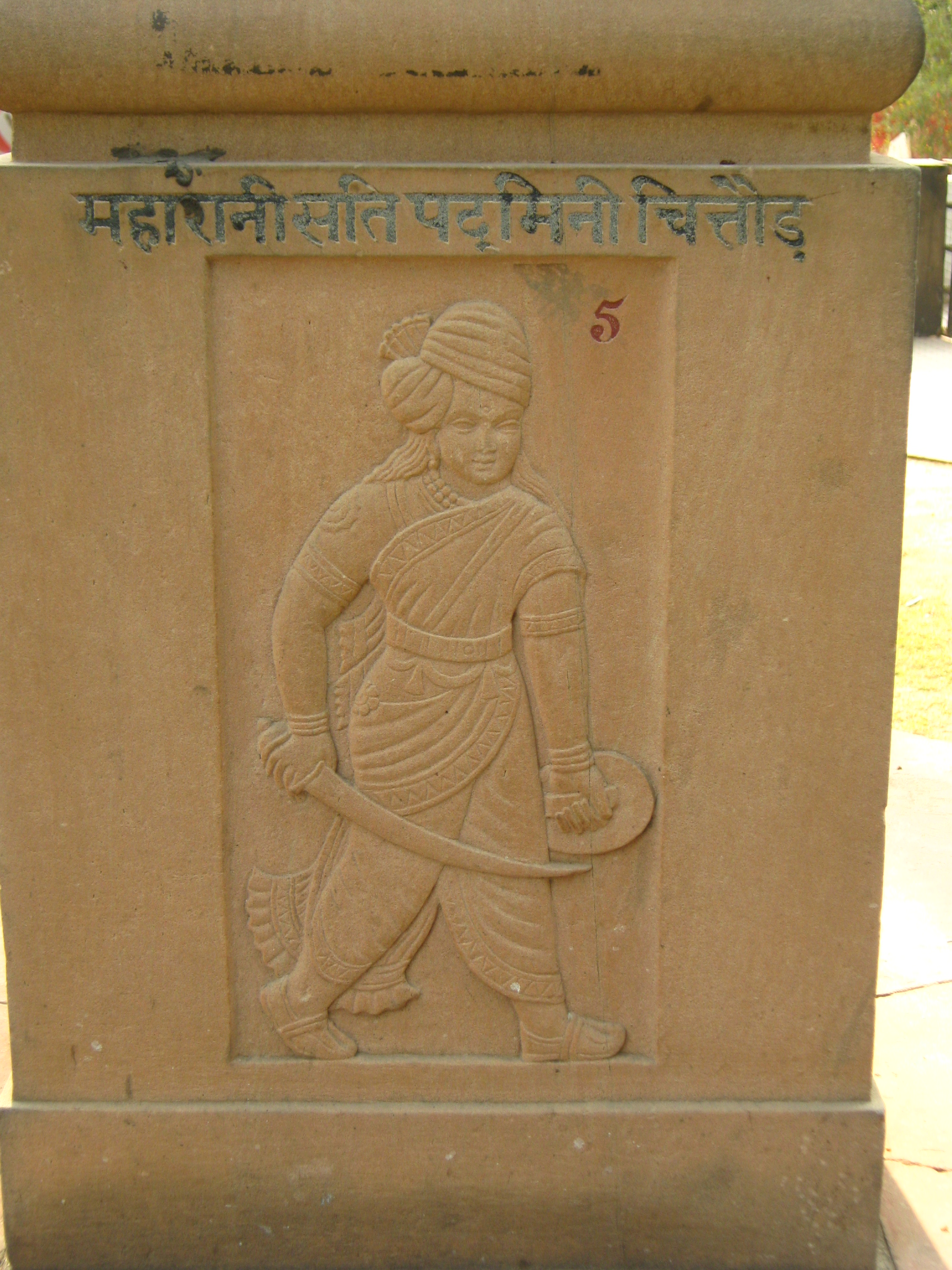 रानी पद्मिनी का शैल-चित्र, बिरला मंदिर, दिल्ली में